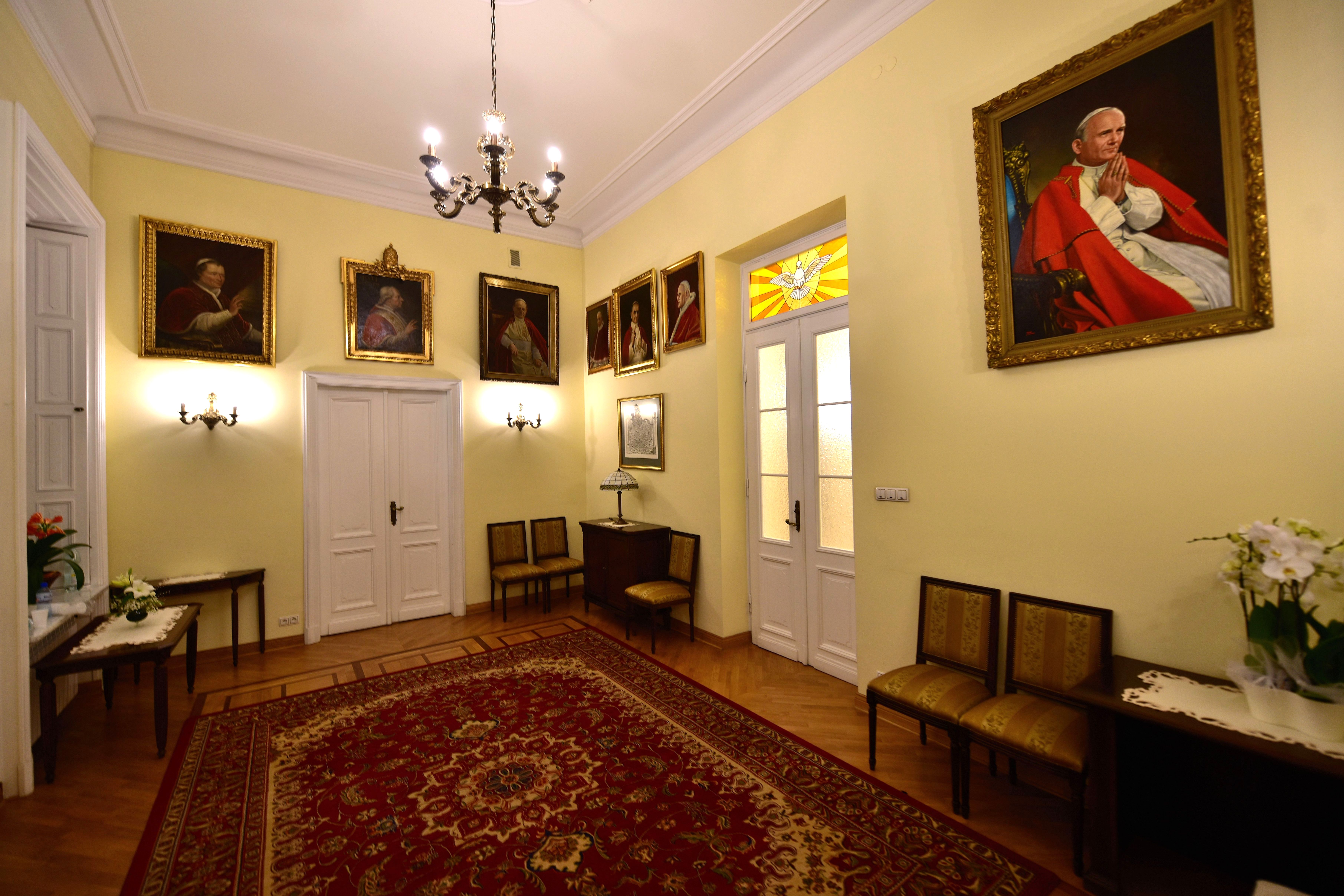 Tzw. mały salon papieski w pałacu Borchów (Domu Arcybiskupów Warszawskich) przy ul. Miodowej 17/19 w Warszawie